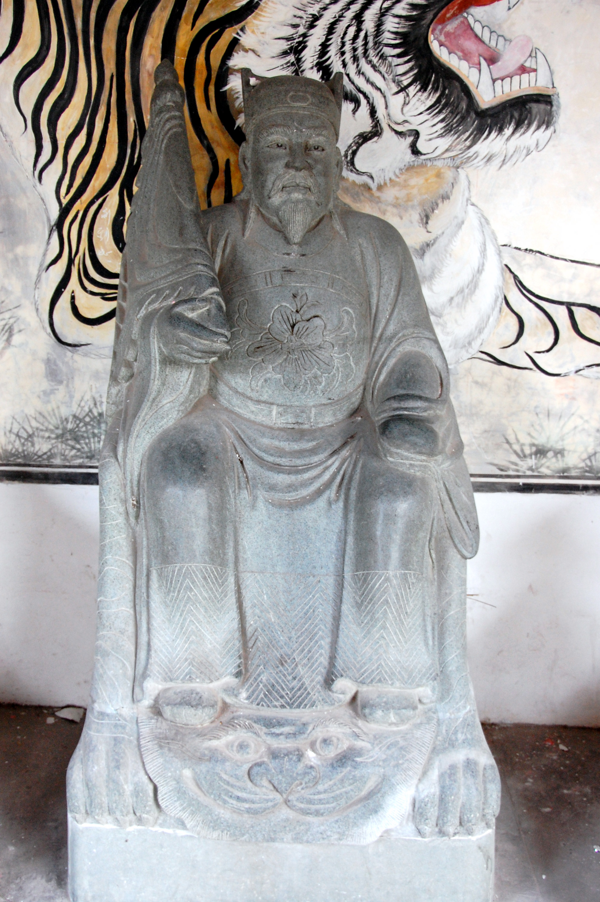 清明上河図/清明上河图